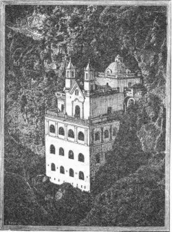 Ilustración de la obra "APUNTES DE UN VIAJE POR EL SUR DE LA NUEVA GRANADA, EN 1853" Por Santiago Pérez